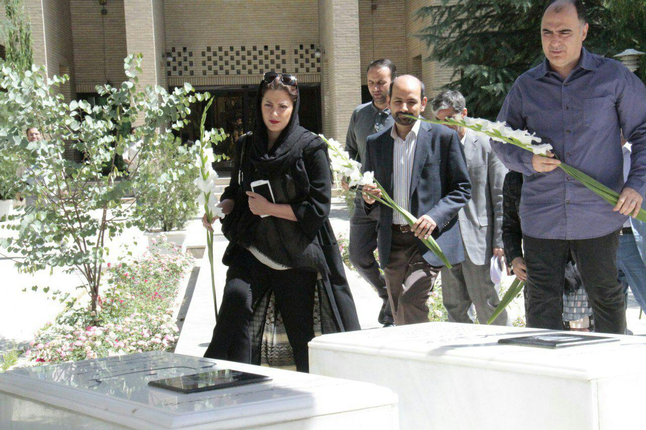 ادای احترام طناز طباطبایی و عوامل فیلم ویلایی ها به مزار شهید دانشگاه صدا و سیما